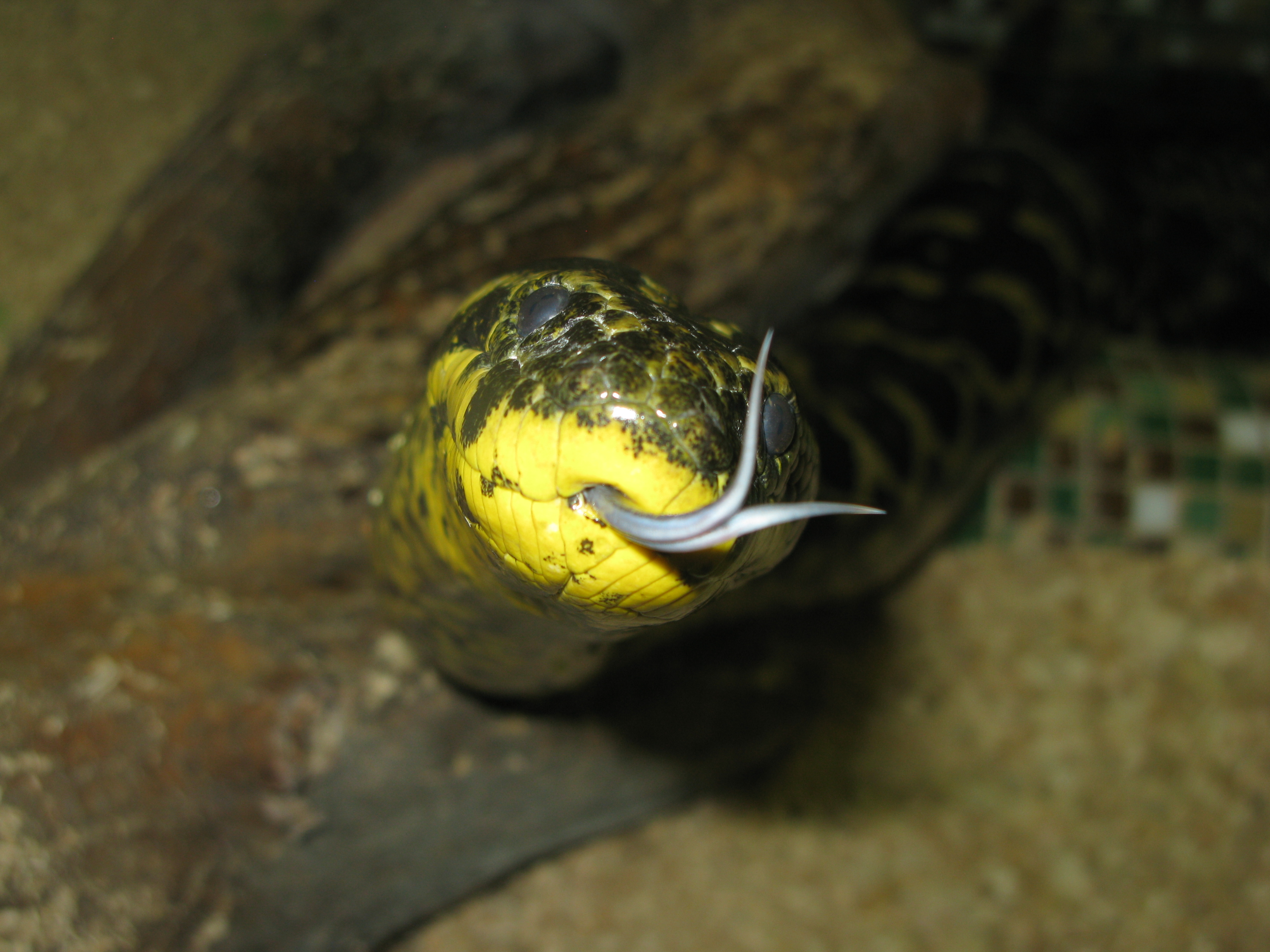 Парагвайская анаконда (Eunectes notaeus) в ззопарке города Гродно, Беларусь.